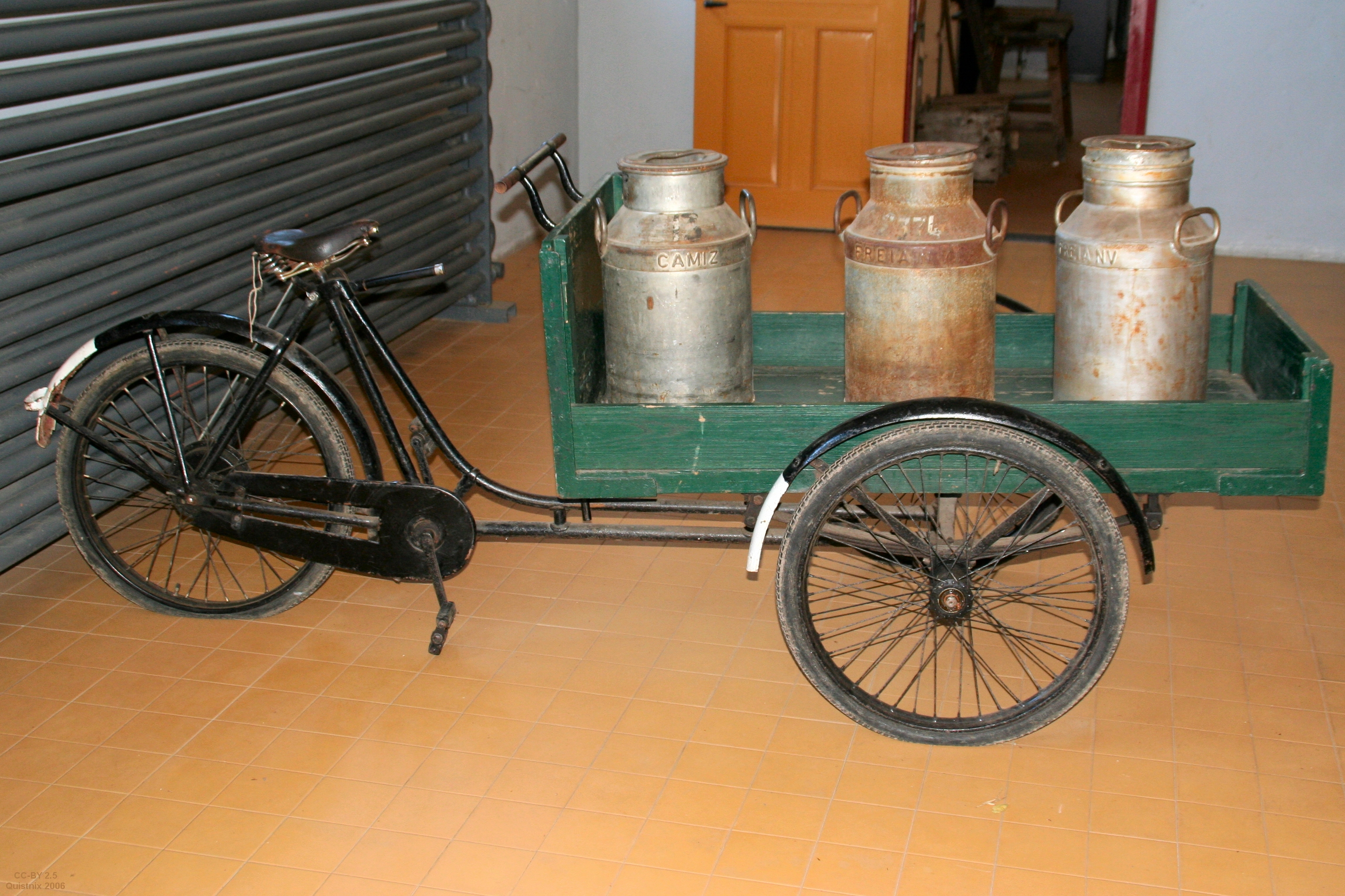 Bakfiets in het openluchtmuseum in Arnhem - eigen werk.